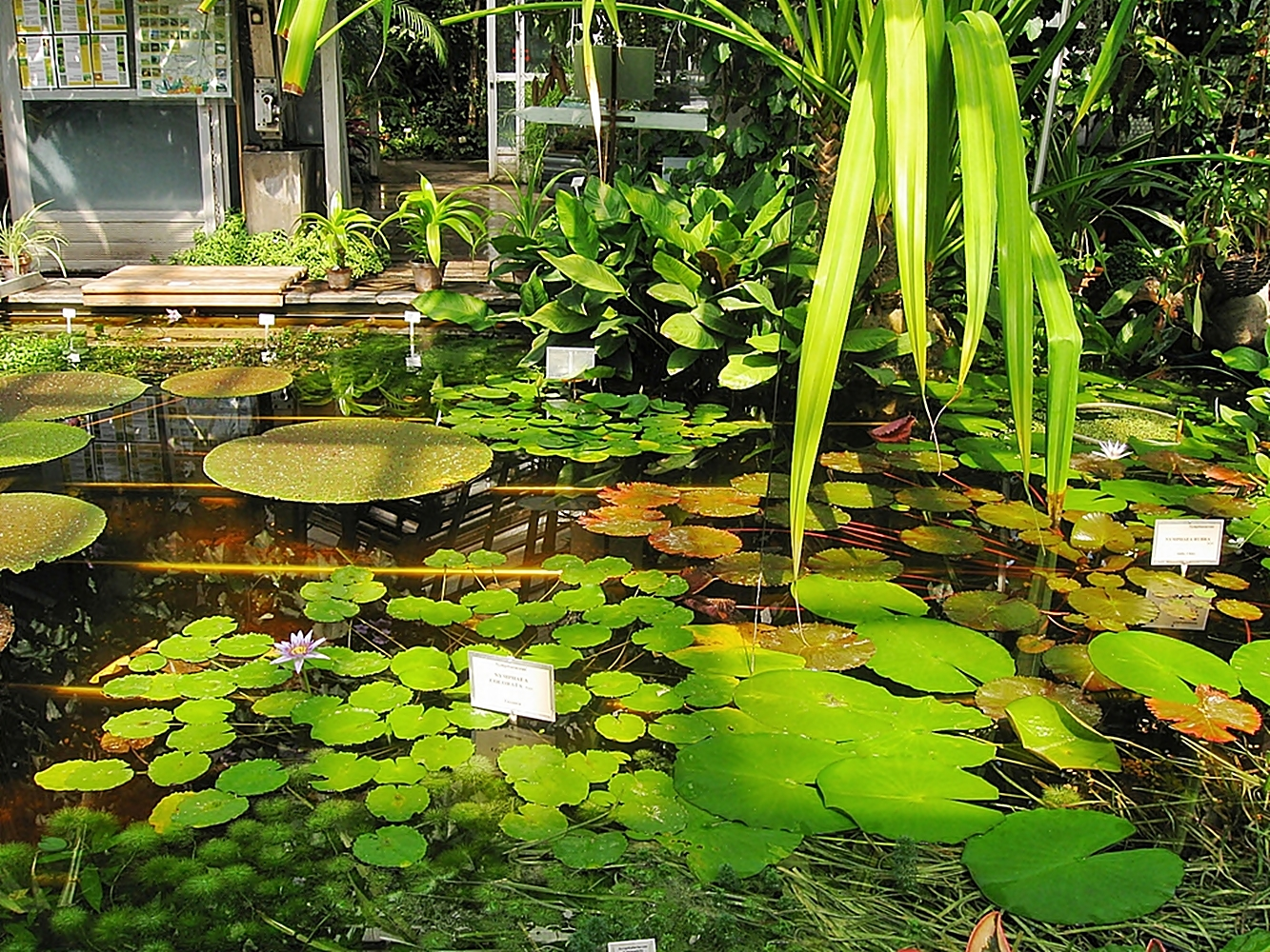 teren ogrodu